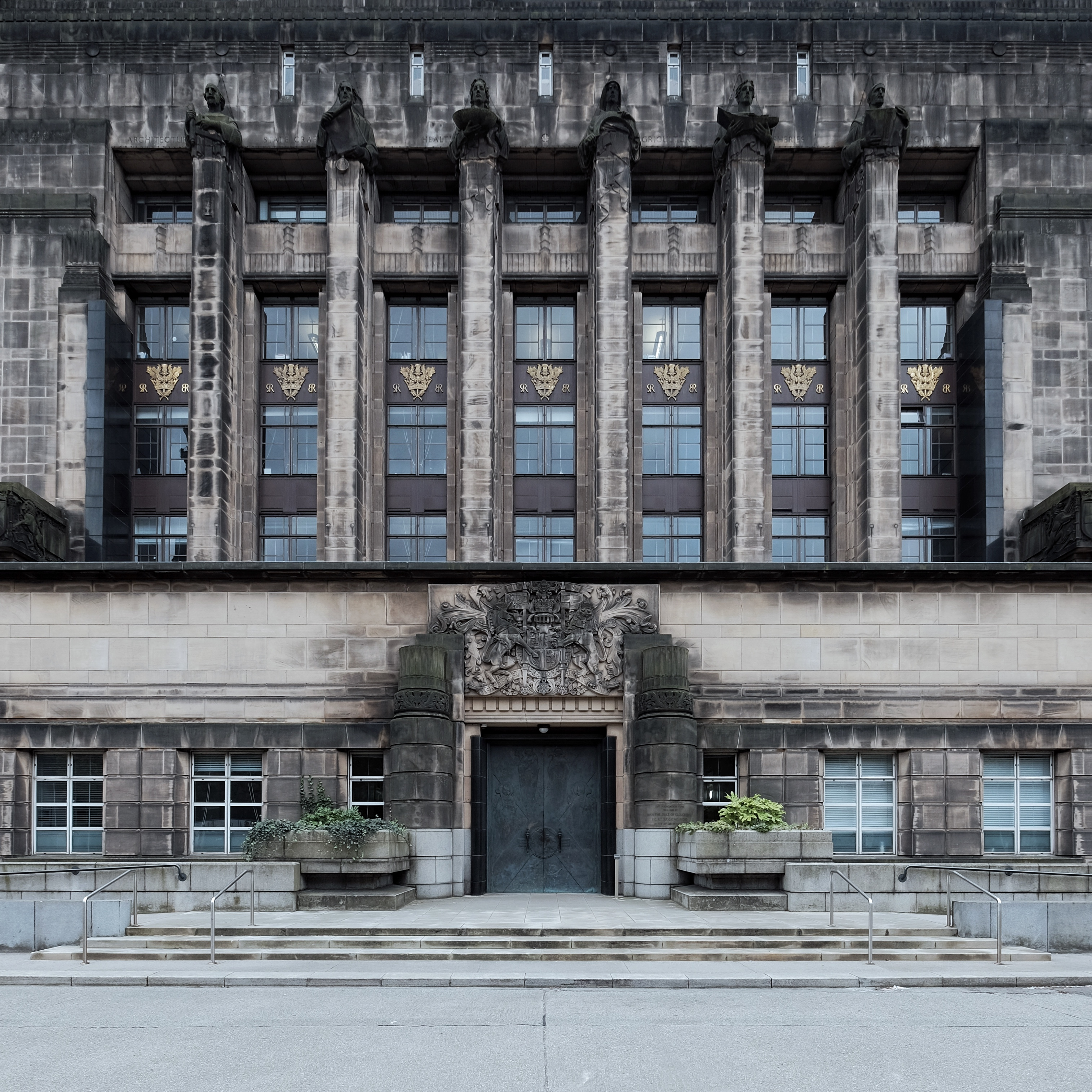 Main entrance of the St Andrew’s house in Edinburgh.